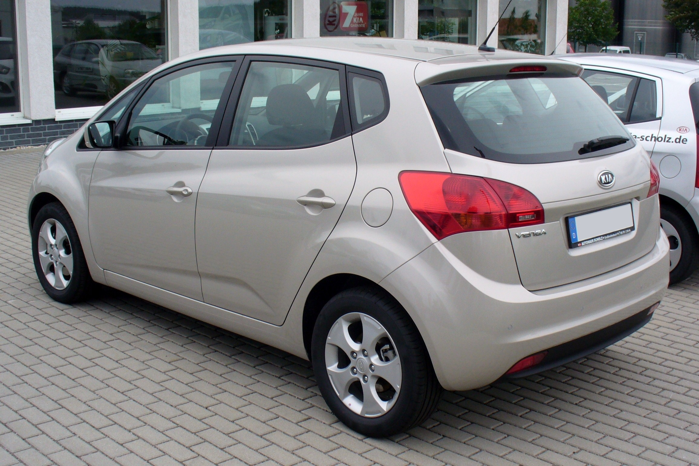 Kia Venga